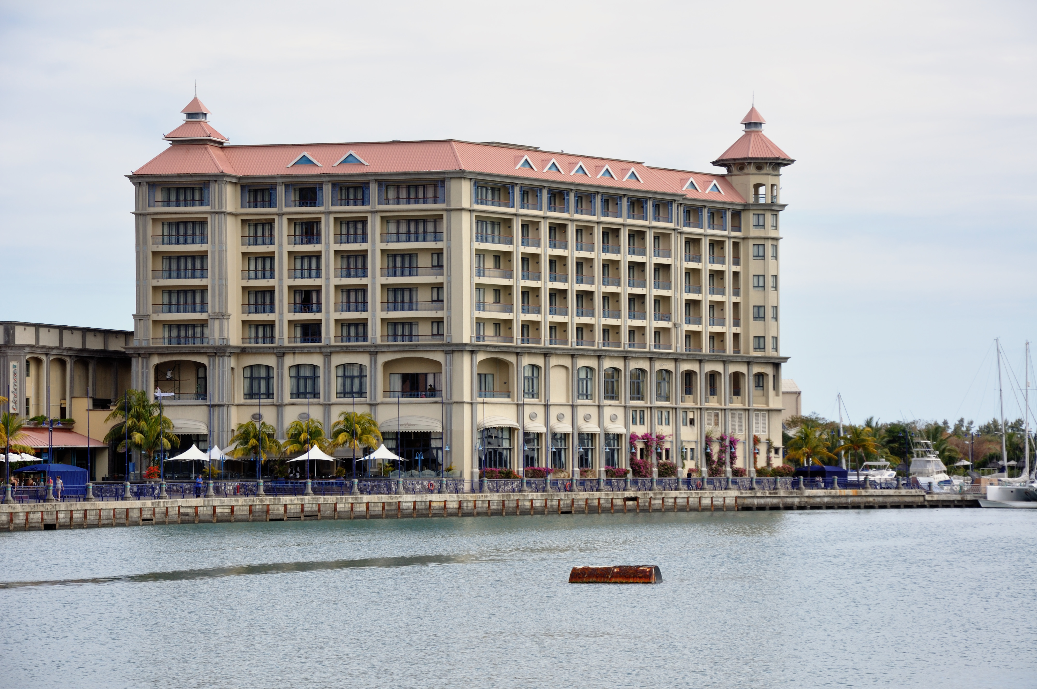 Mauritius, Hotel Labourdonnais